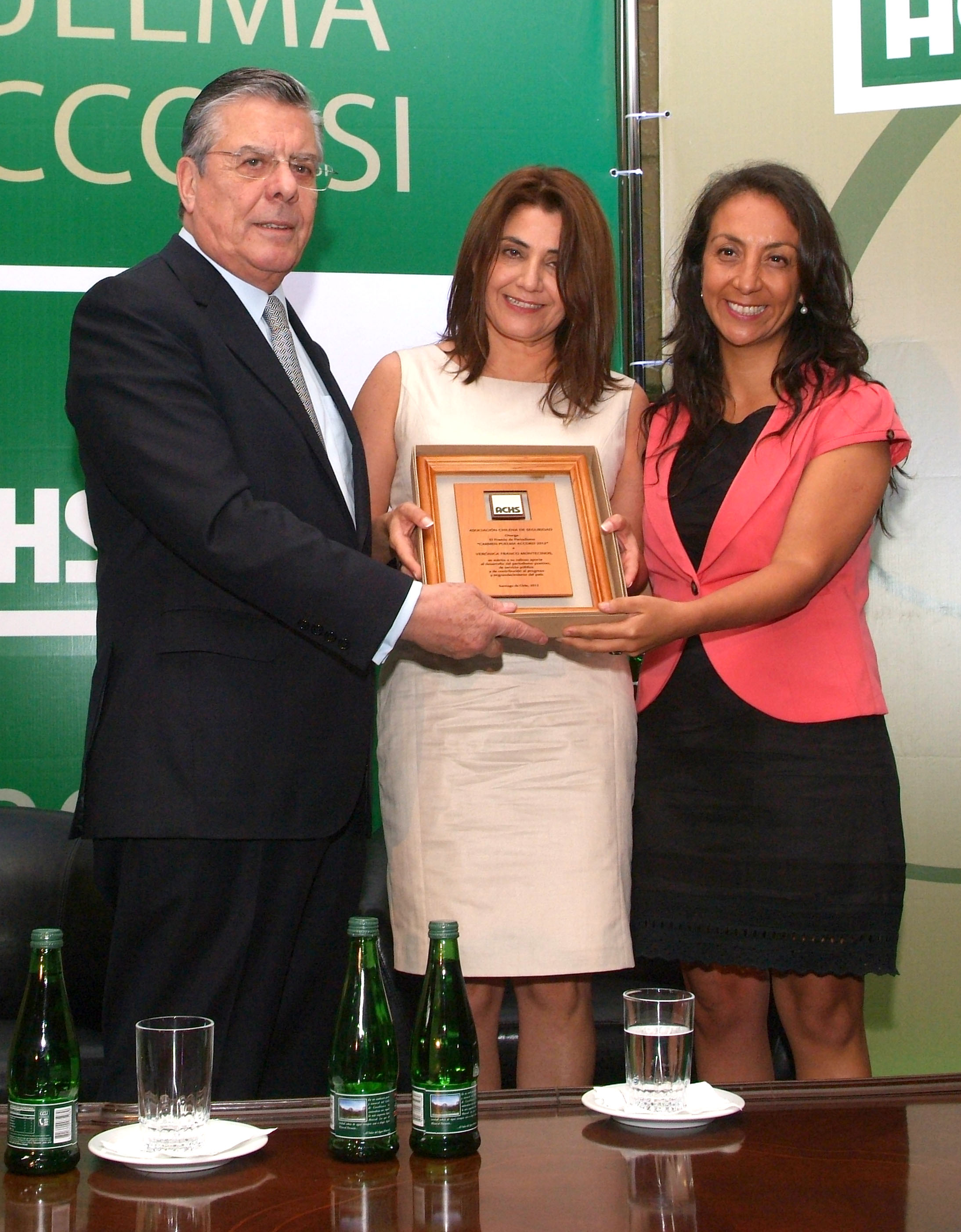 Ministra Secretaria General de Gobierno,Cecilia Pérez participa en la entrega del Premio Carmen Puelma a la Periodista Verónica Franco.